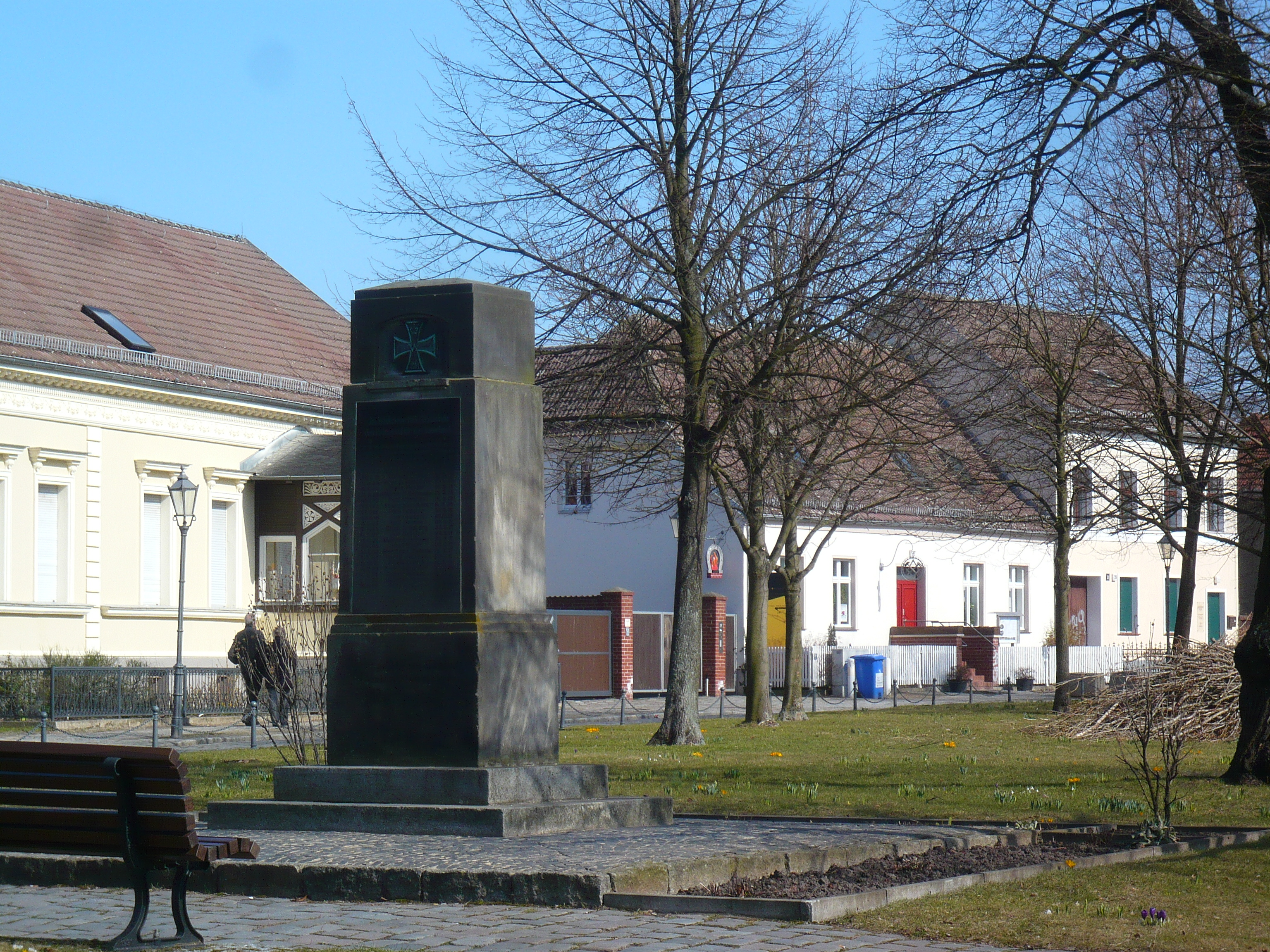 Ortsteil Marzahn, alter Dorfkern